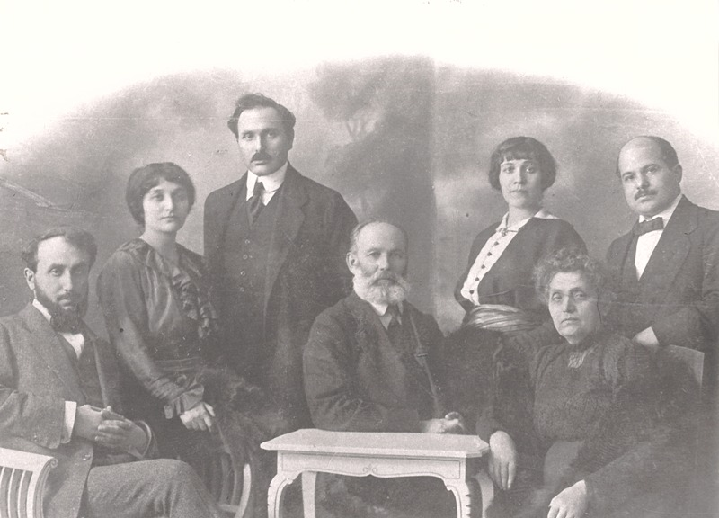 Семейство Габе – в центъра Петър (Пейсах) и Екатерина Габе, отляво надясно Боян Пенев, Дора (Изидора) Габе, Сеня (Израел) Габе, Бела (Изабела) Габе и Спиридон Казанджиев